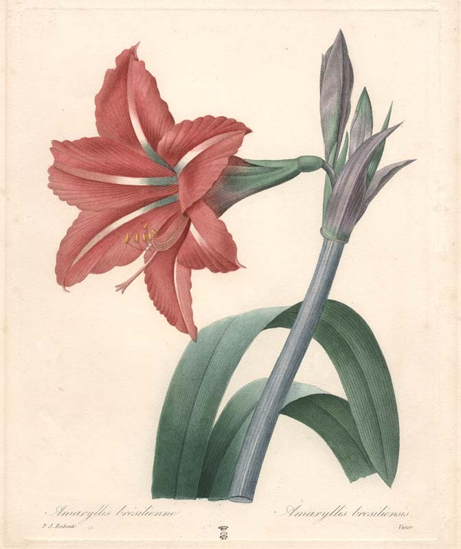 Hippeastrum ×johnsonii